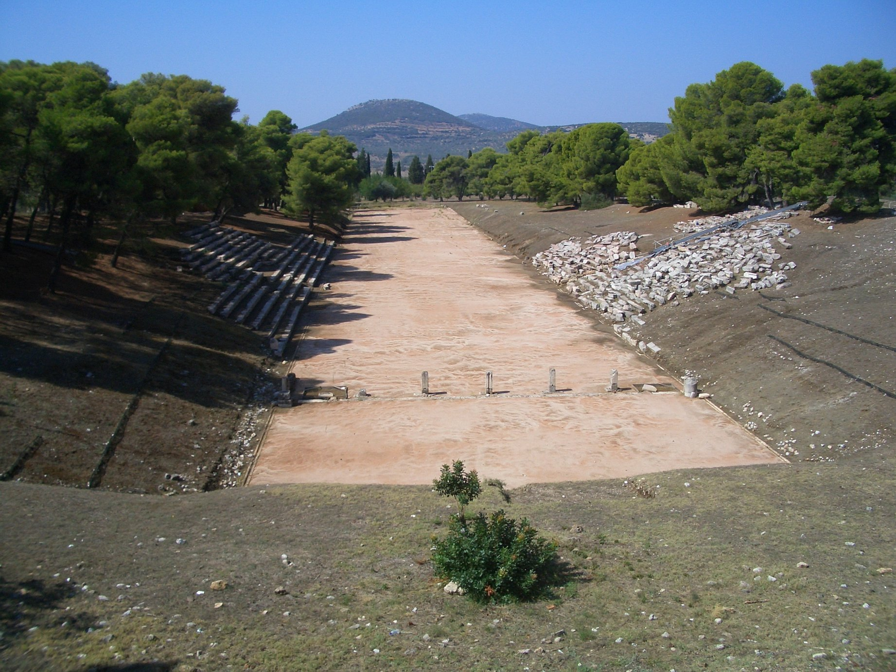 Stadion in Epidauros